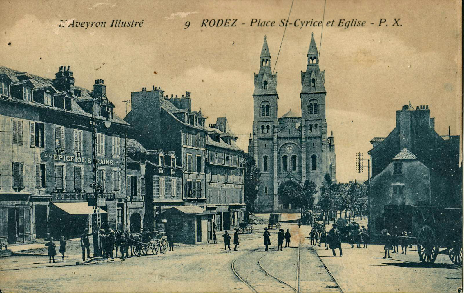 Carte postale ancienne édite par P. X. n°9, collection « L'Aveyron illustré » : RODEZ - Place Saint-Cyrice et Eglise